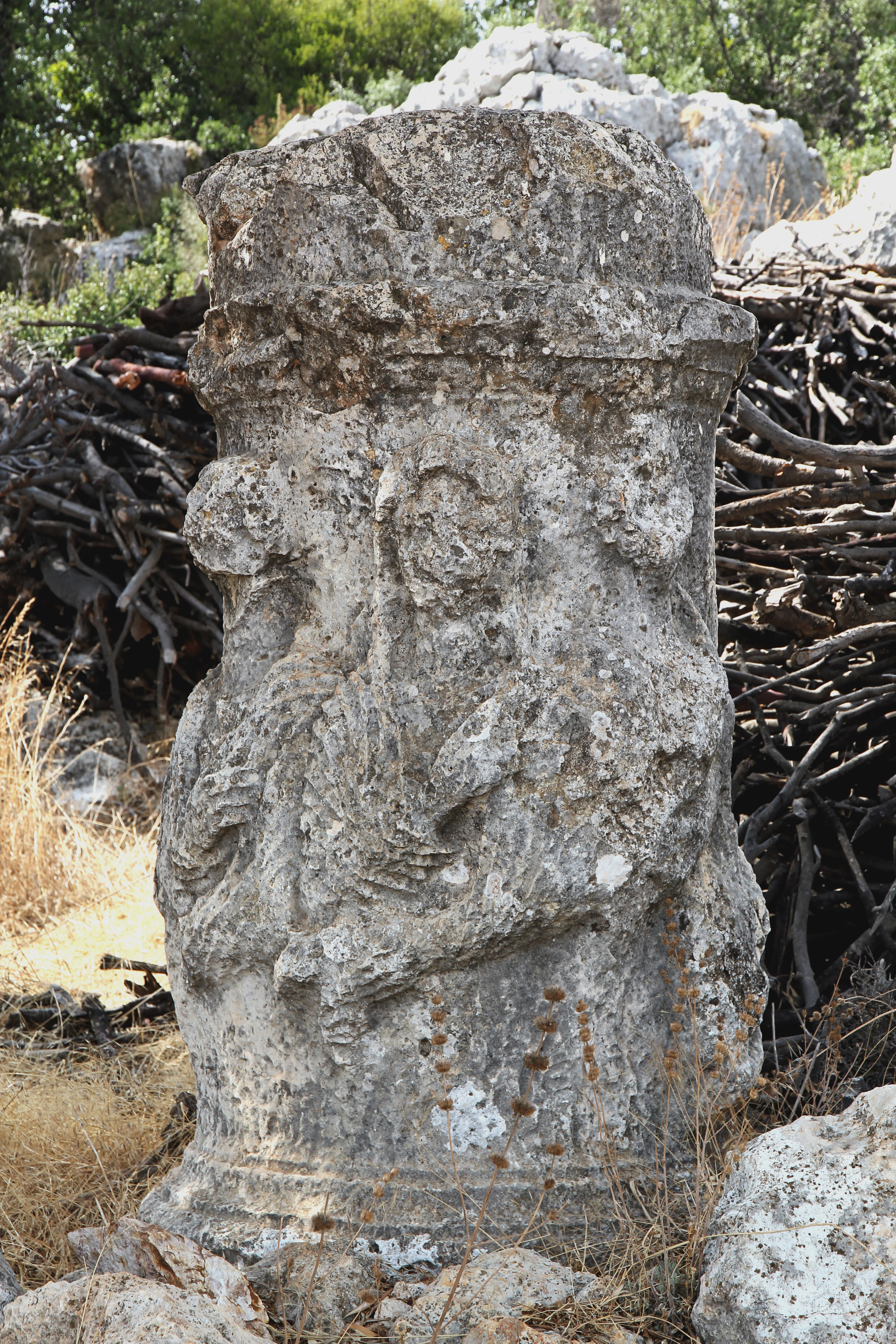 Sarıveliler, Säulenaltar, Altartrommel in der Südtürkei